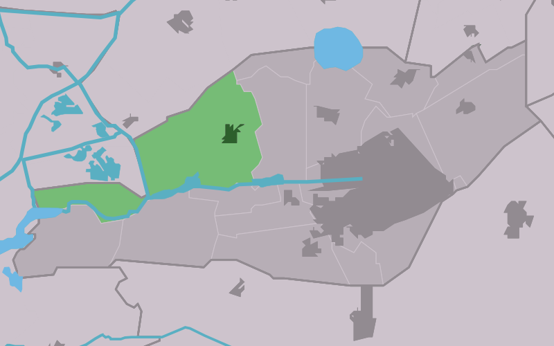 Kaartsje fan himrik fan Aldegea